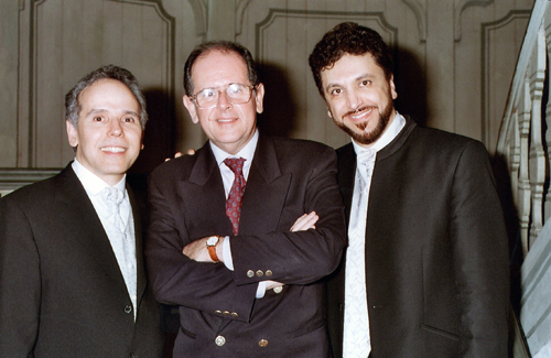 Maximiliano de Brito, Ronaldo Miranda, Renato Mismetti